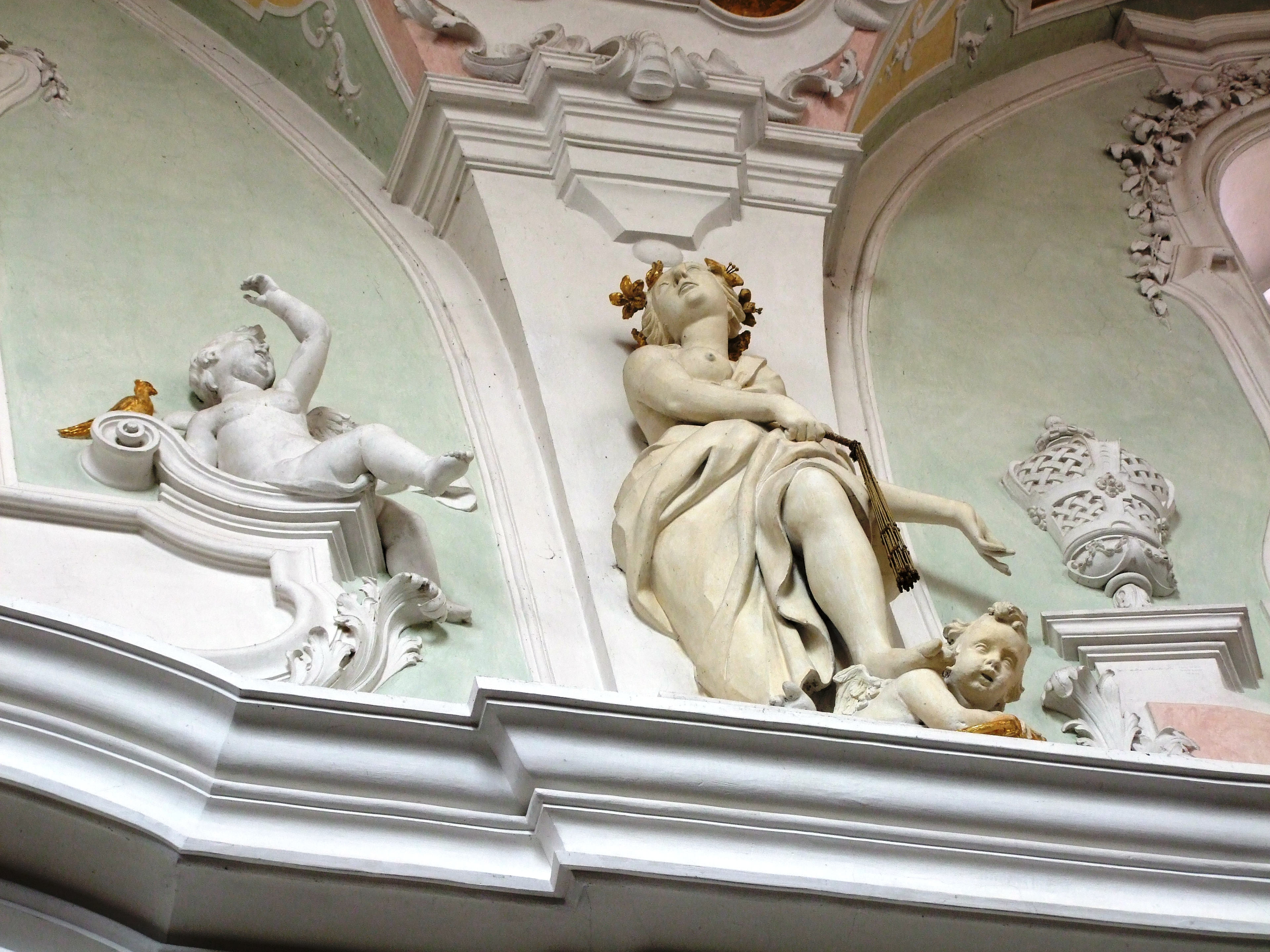 St. Georg, ehemalige Klosterkirche des oberschwäbischen Klosters Ochsenhausen - Keuschheit